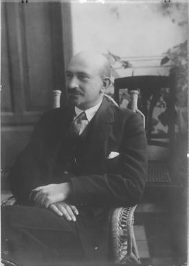 ד"ר חיים ויצמן.